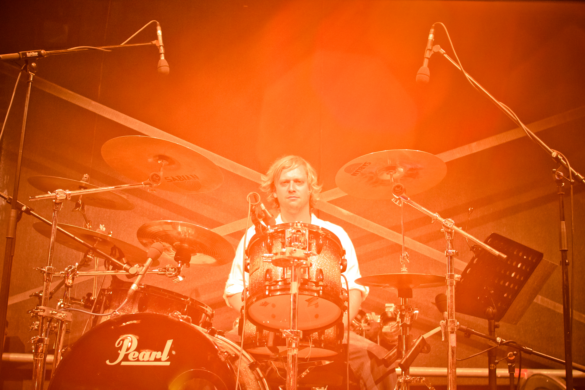 Impressionen Europäische Sommerlounge 3